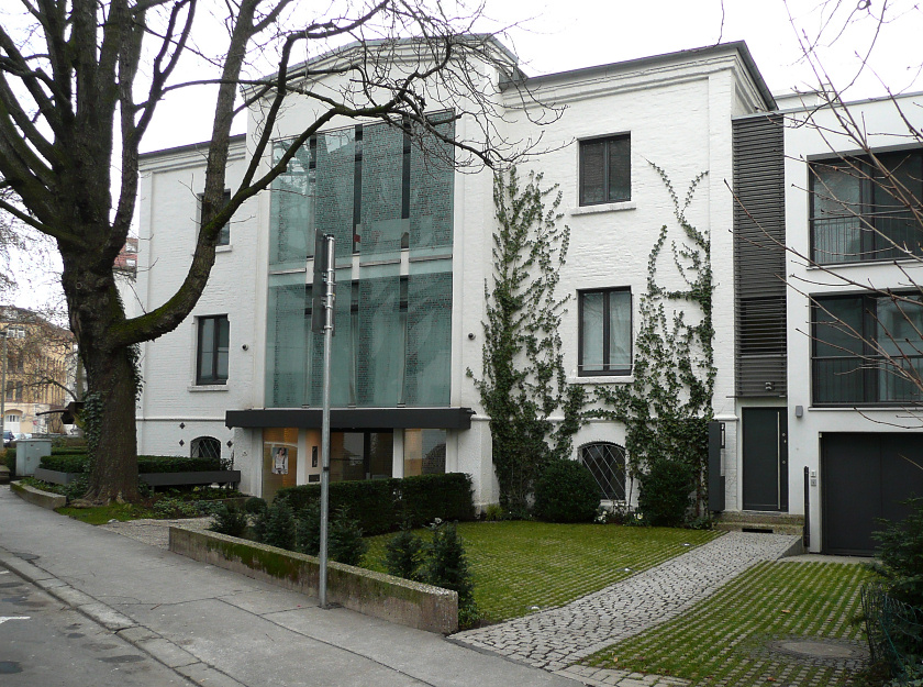 Sitz der Stiftung Ahlers Pro Arte in der Warmbüchenstr. 16, Hannover